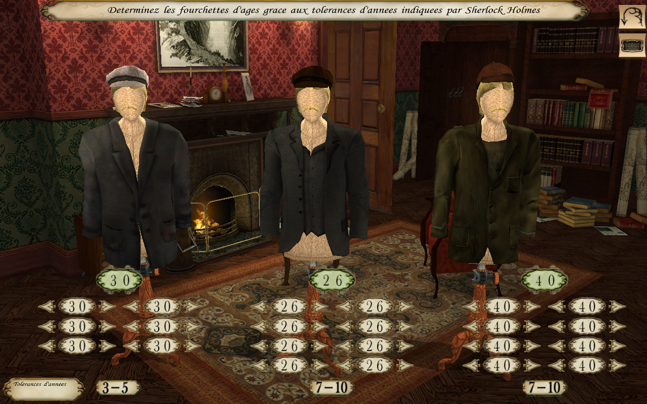 Capture d'écran du jeu Sherlock Holmes contre Jack l'Éventreur dans sa version bêta. Capture réalisée vers la fin du jeu, au moment de déterminer l'âge du tueur. La présentation de cette énigme a été améliorée dans la version finale. Ici, la première ligne de chaque colonne n'est pas remplie d'avance, le titre de l'énigme n'a aucun accent, et le décor d'arrière-plan est légèrement différent de celui de la version finale.